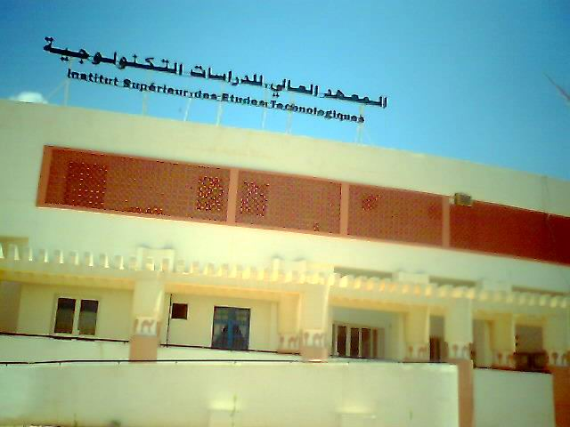 Iset de Gafsa, Tunisie